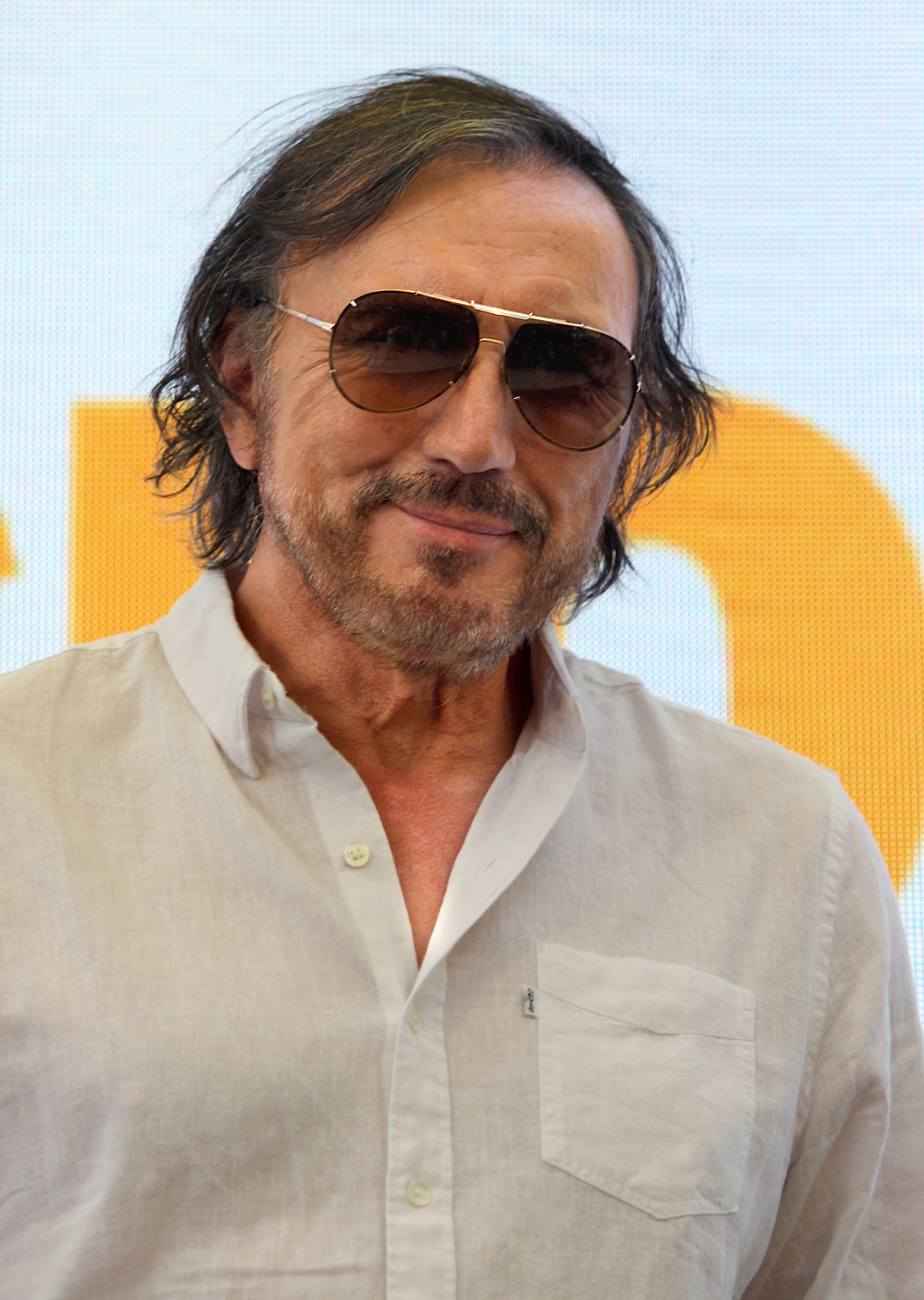 El periodista y escritor chileno Carlos Pinto durante la segunda etapa del Festival de Autores de Santiago 2018 realizada en el GAM. Pinto presentó allí su libro El silencio de los malditos.